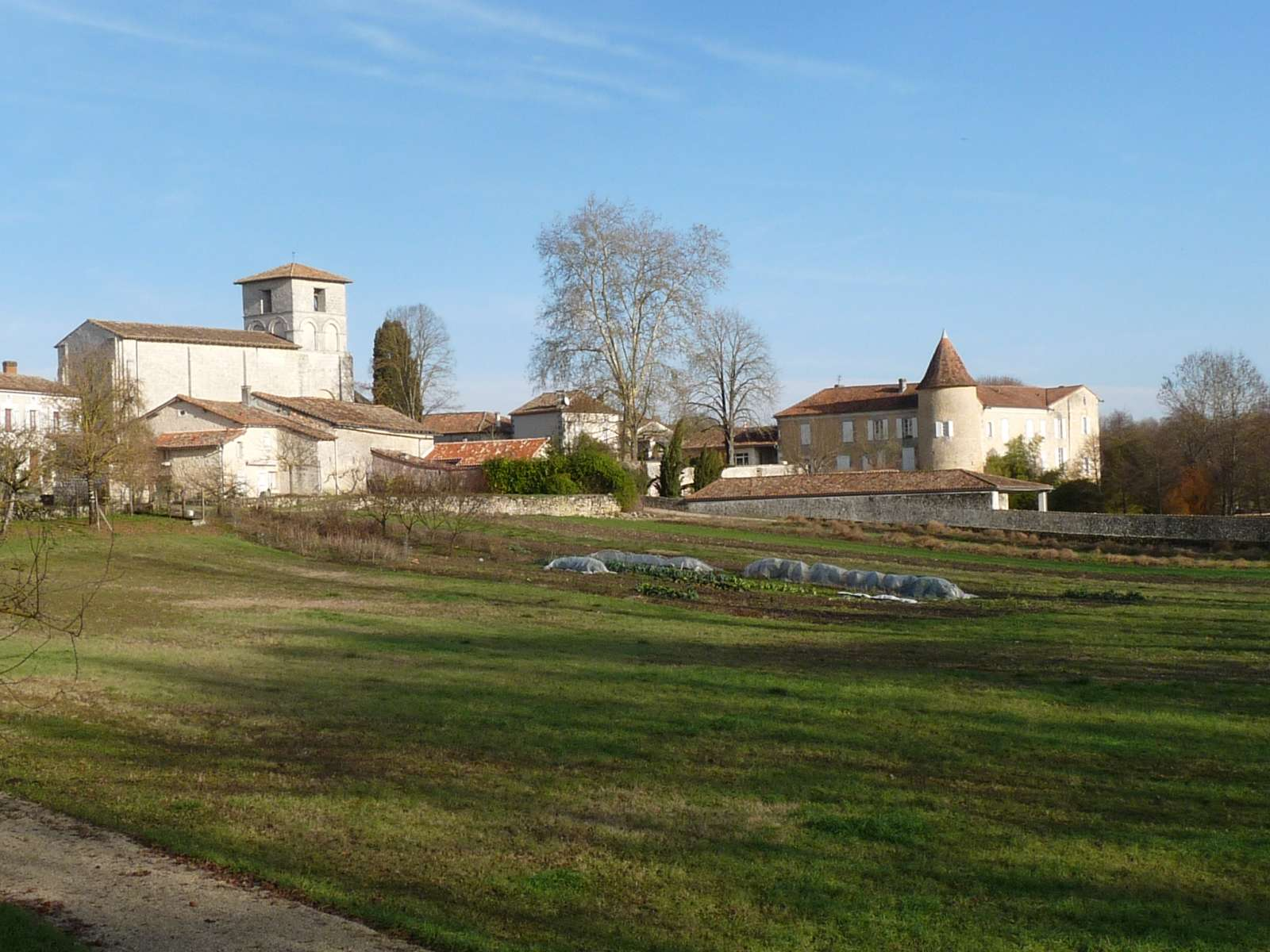 vue de Blanzaguet, Charente, France